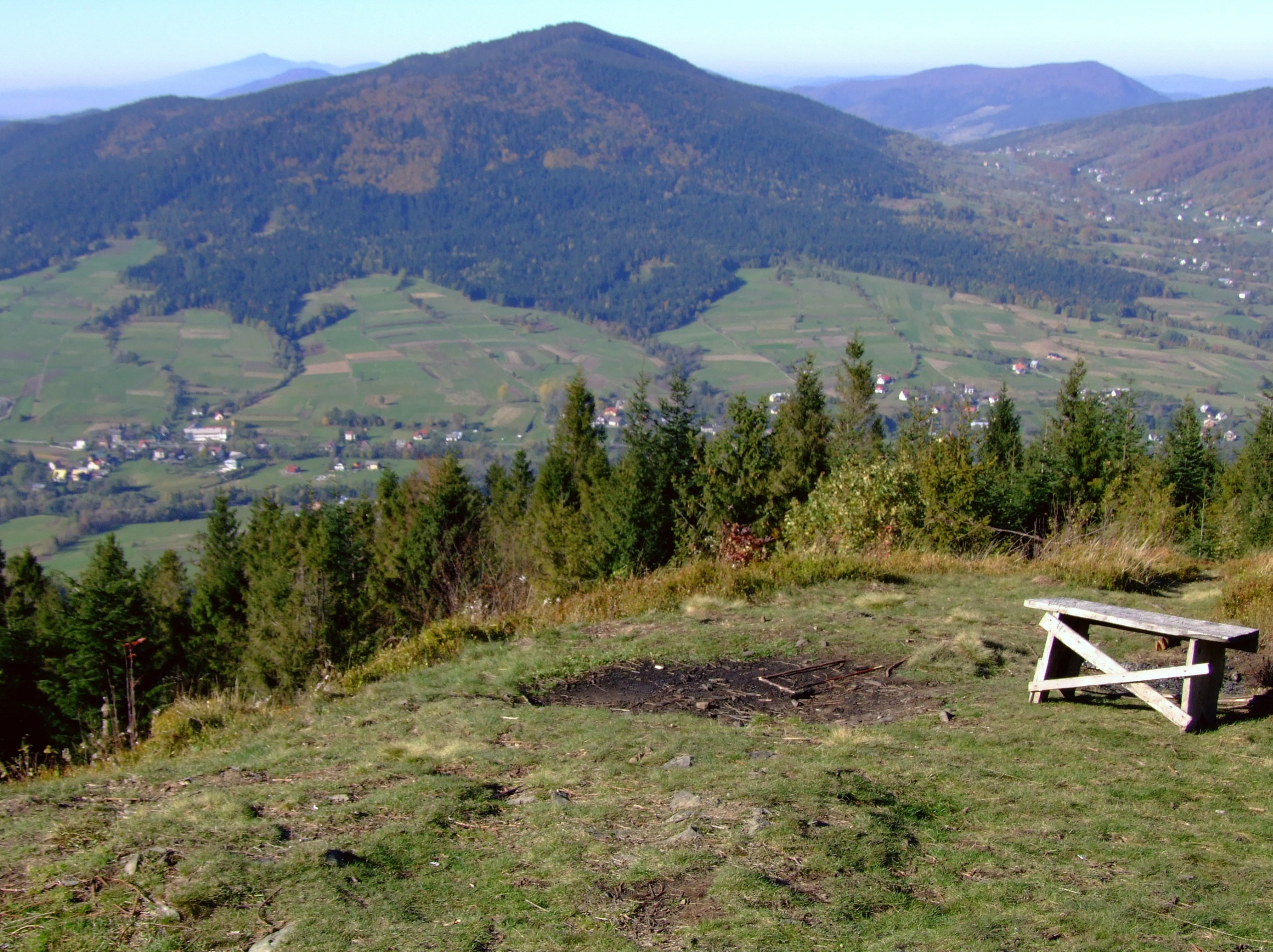 Ćwilin (Beskid Wyspowy). Widok z Łopienia